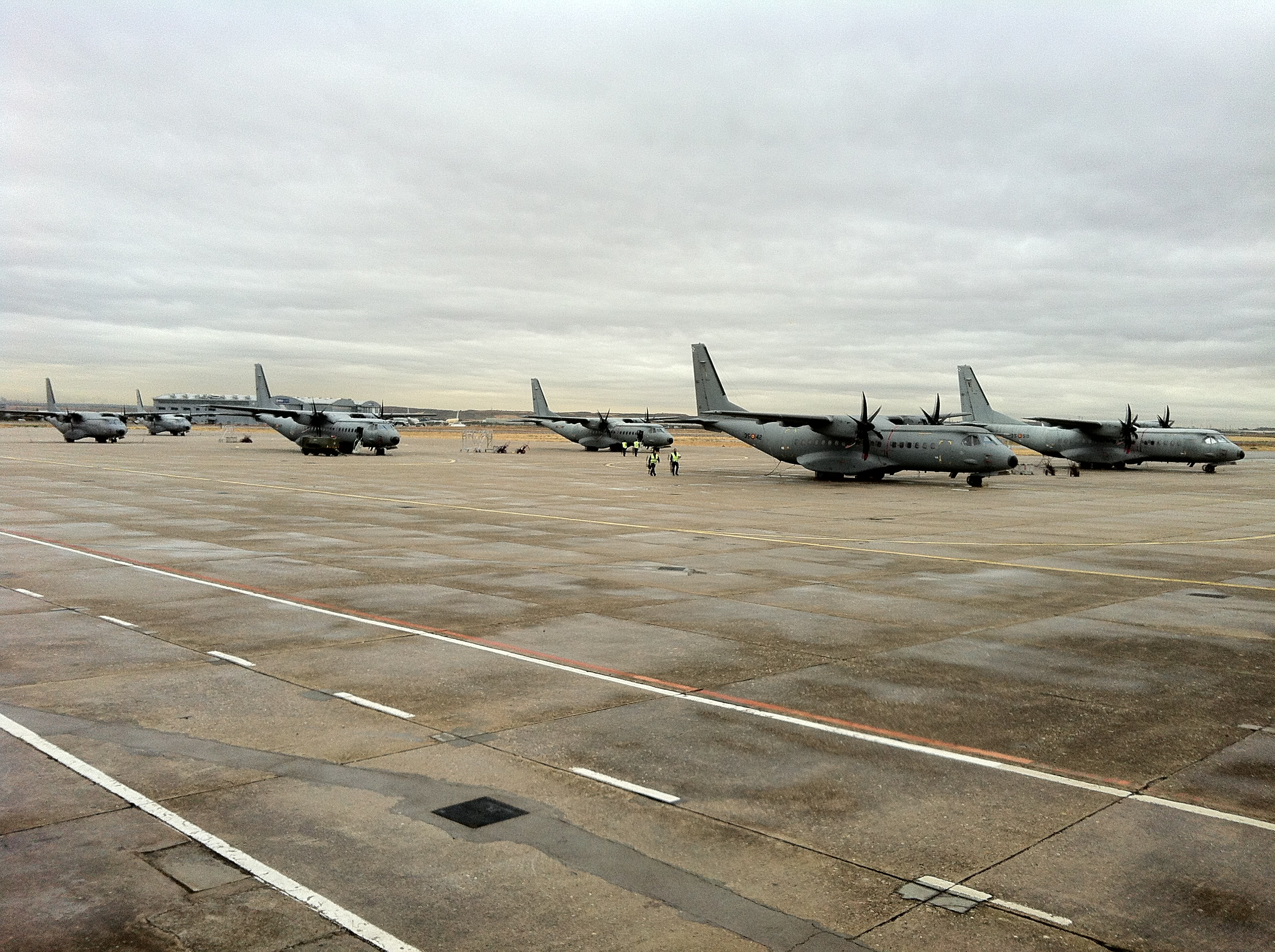 Aeronaves Casa C-295 pertenecientes al Ejército del Aire de España en la base aérea de Getafe en 2012. De fondo pueden verse las industrias aeronáuticas de Airbus